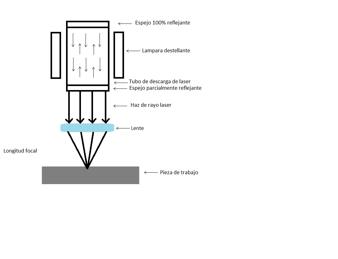 Gráfico de funcionamiento de corte con láser